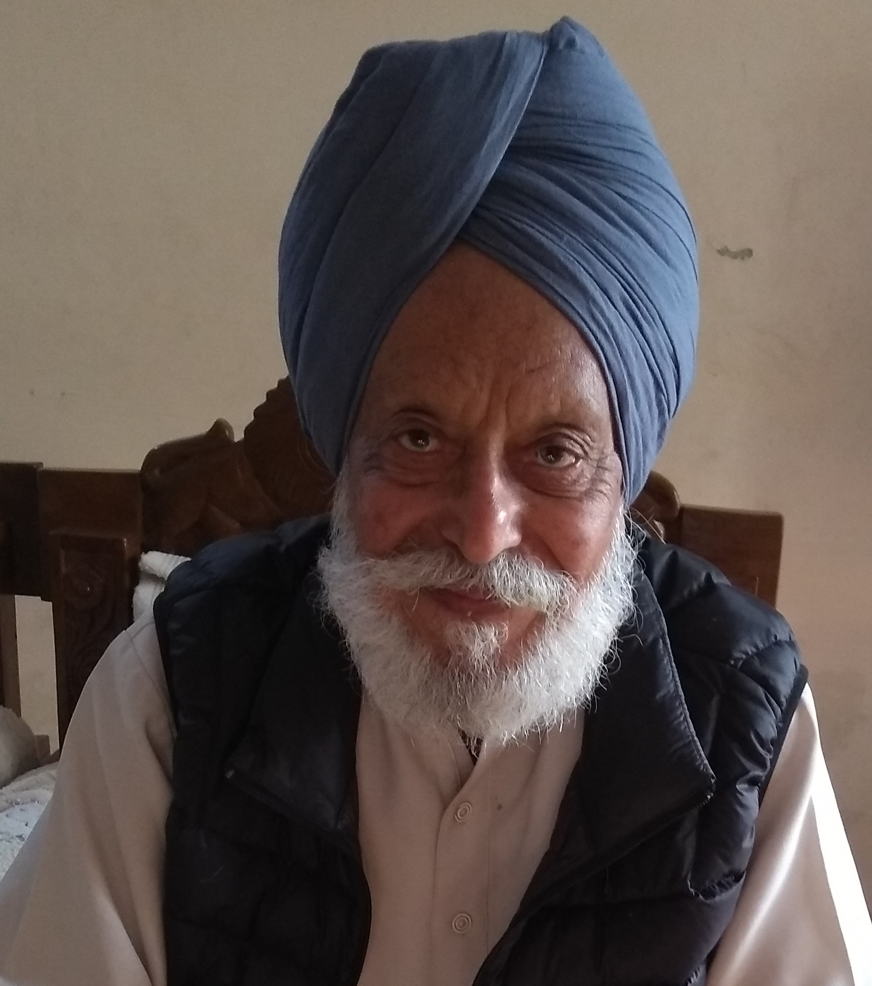 Sukhdev Madpuri